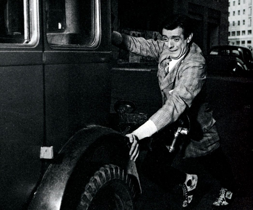 Lo svitato